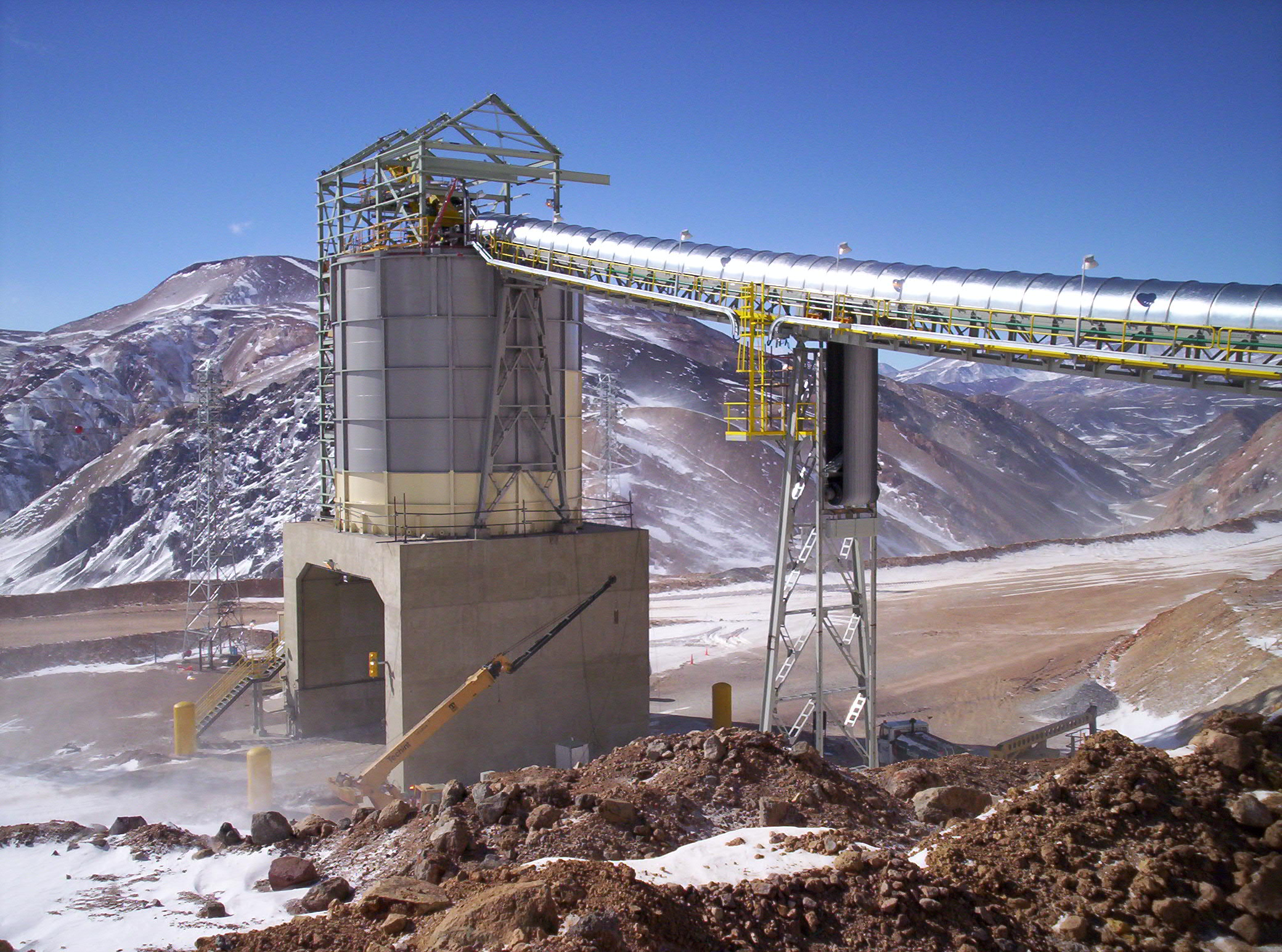 Actividad minera en la Cordillera de los Andes en la provincia argentina de San Juan.